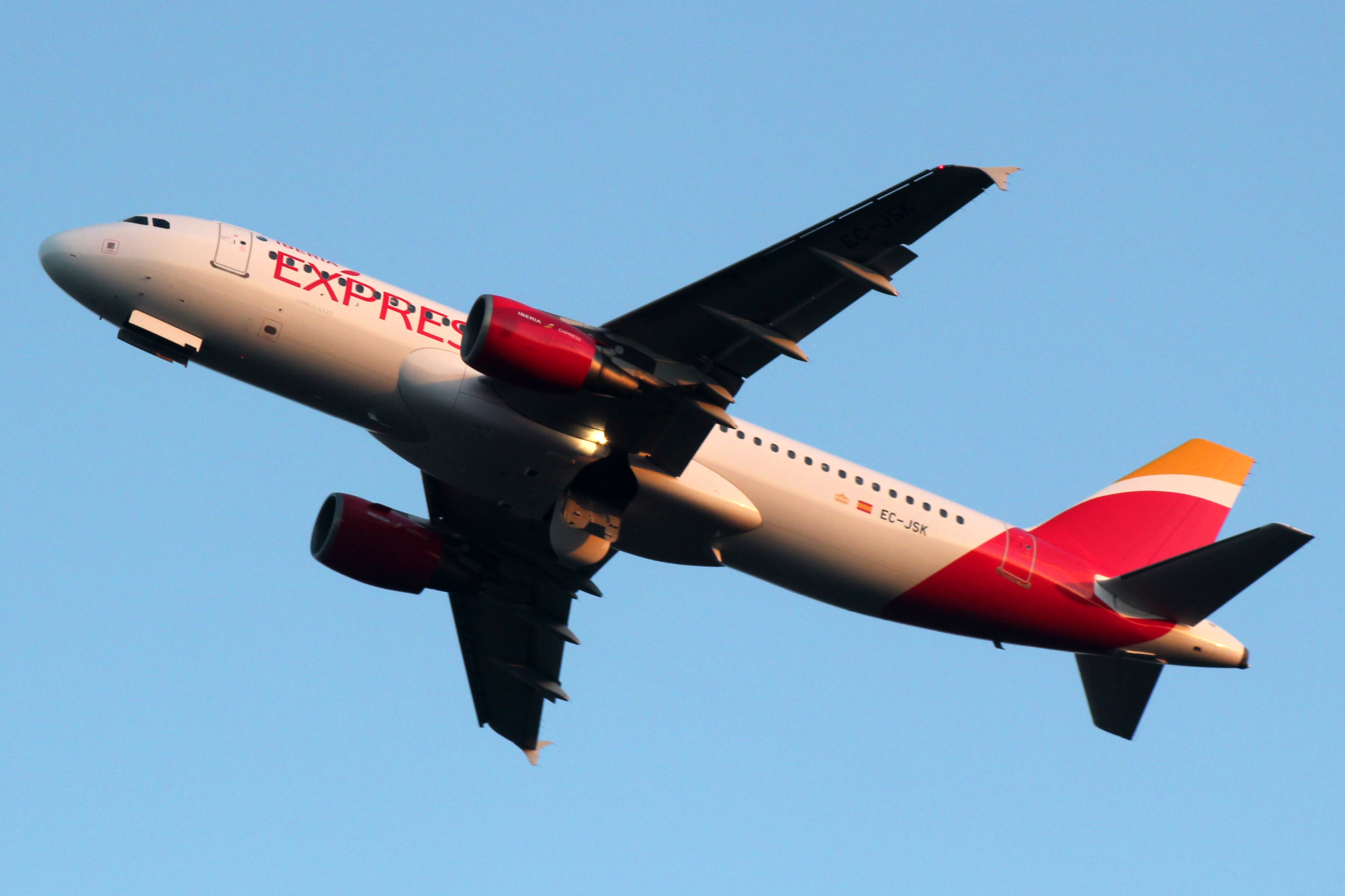 Airbus A320-216 coa nova librea de Iberia Express no aeroporto de Vigo.